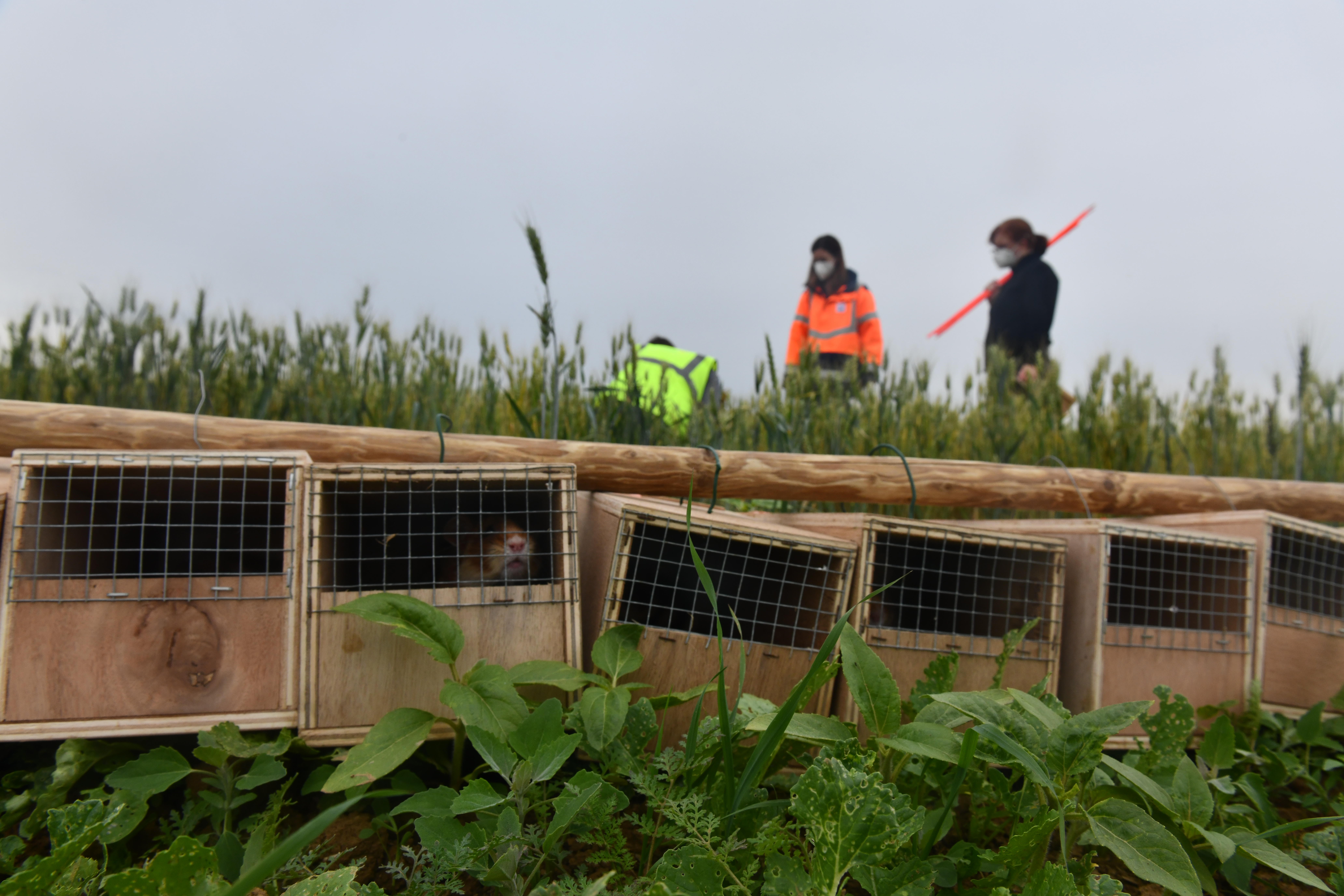 Lâchers de grands hamsters d’Alsace ; Ces opérations sont réalisées par les équipes de SOCOS dans le cadre des mesures compensatoires du Contournement Ouest de Strasbourg.